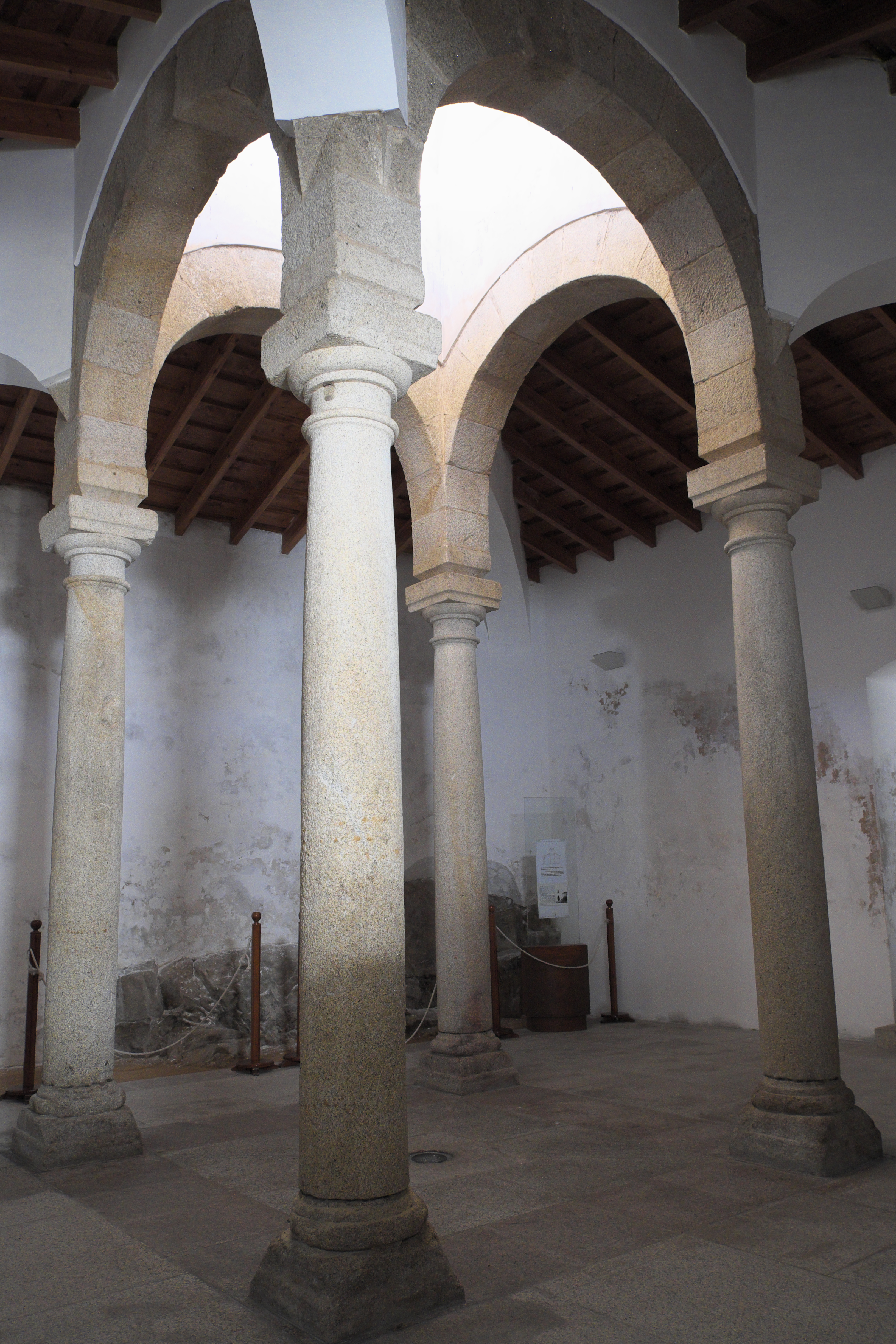 Synagoge im Barrio judío-gótico (Judenviertel) in Valencia de Alcántara in der Provinz Cáceres (Extremadura/Spanien), Innenraum